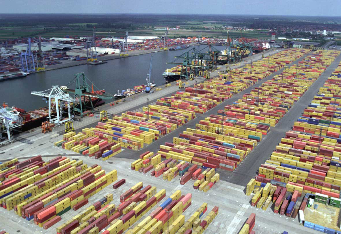 Zicht op het Delwaidedok, rechts MSC Home Terminal.